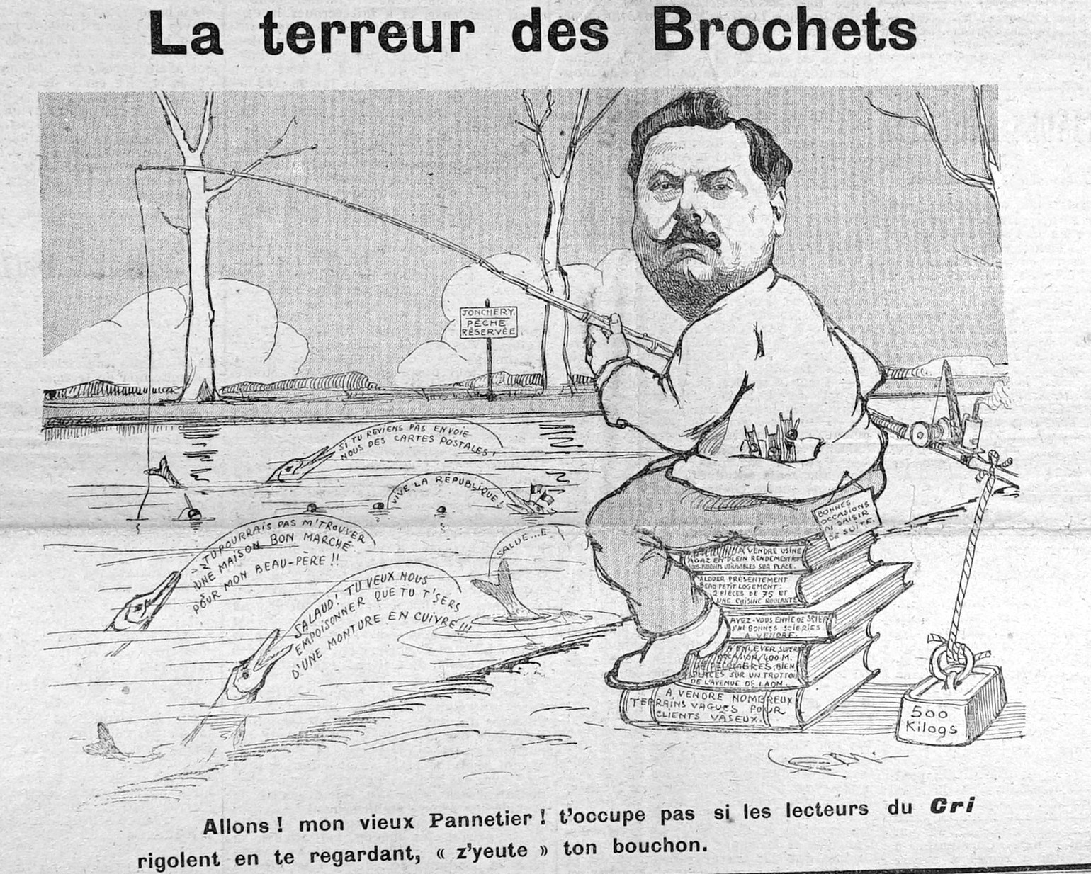 hebdomadaire humoristique et satirique.